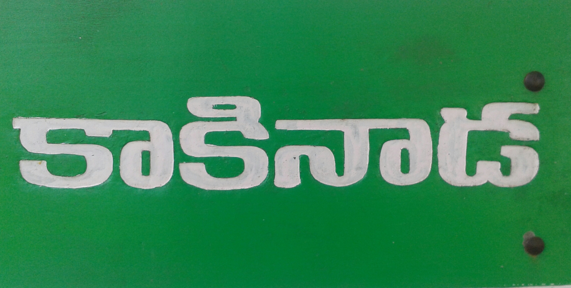 Kakinada written in telugu